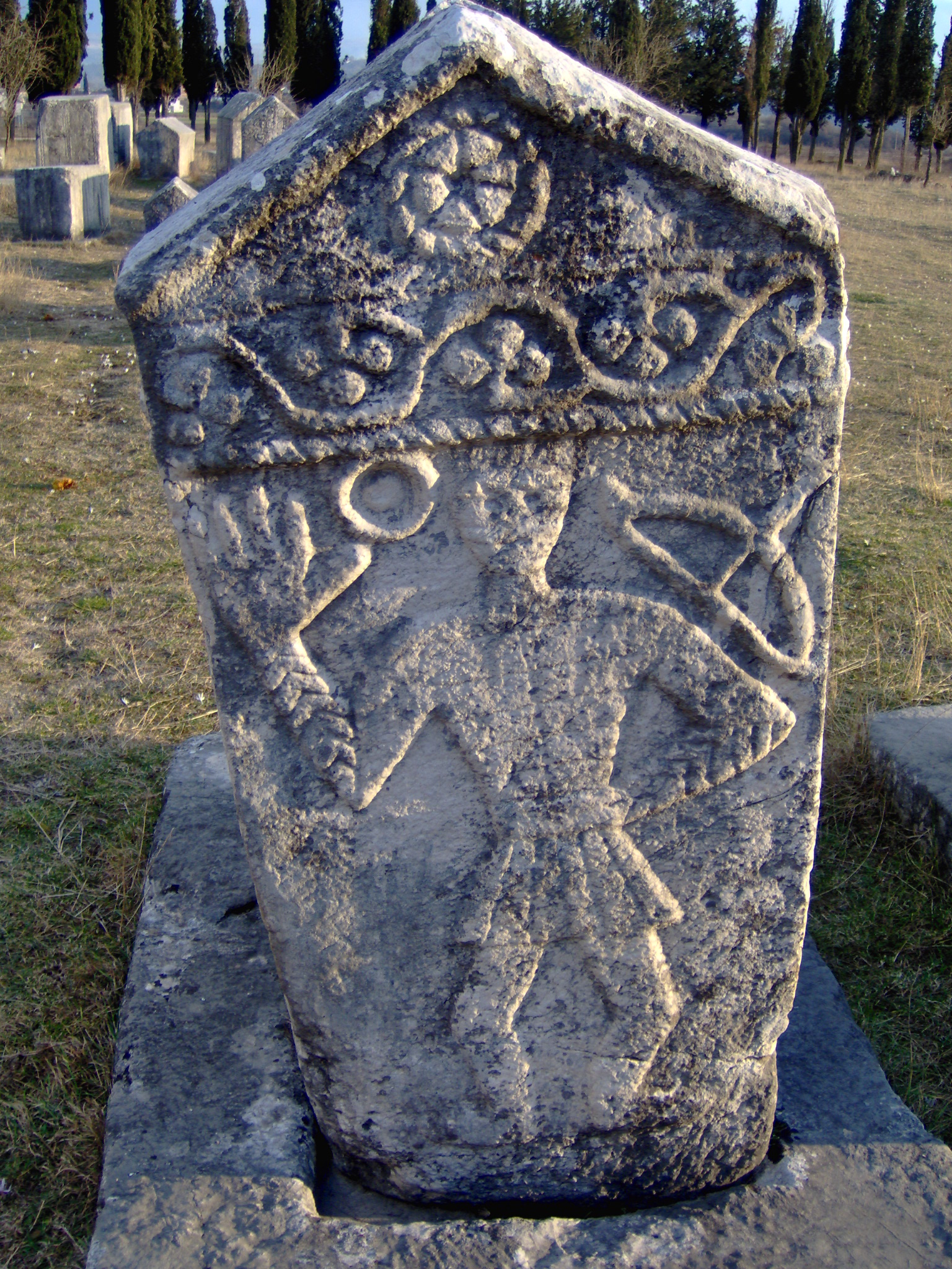 Stecci-gravar i Radimlja (i Hercegovina), bosniska-gravstenar